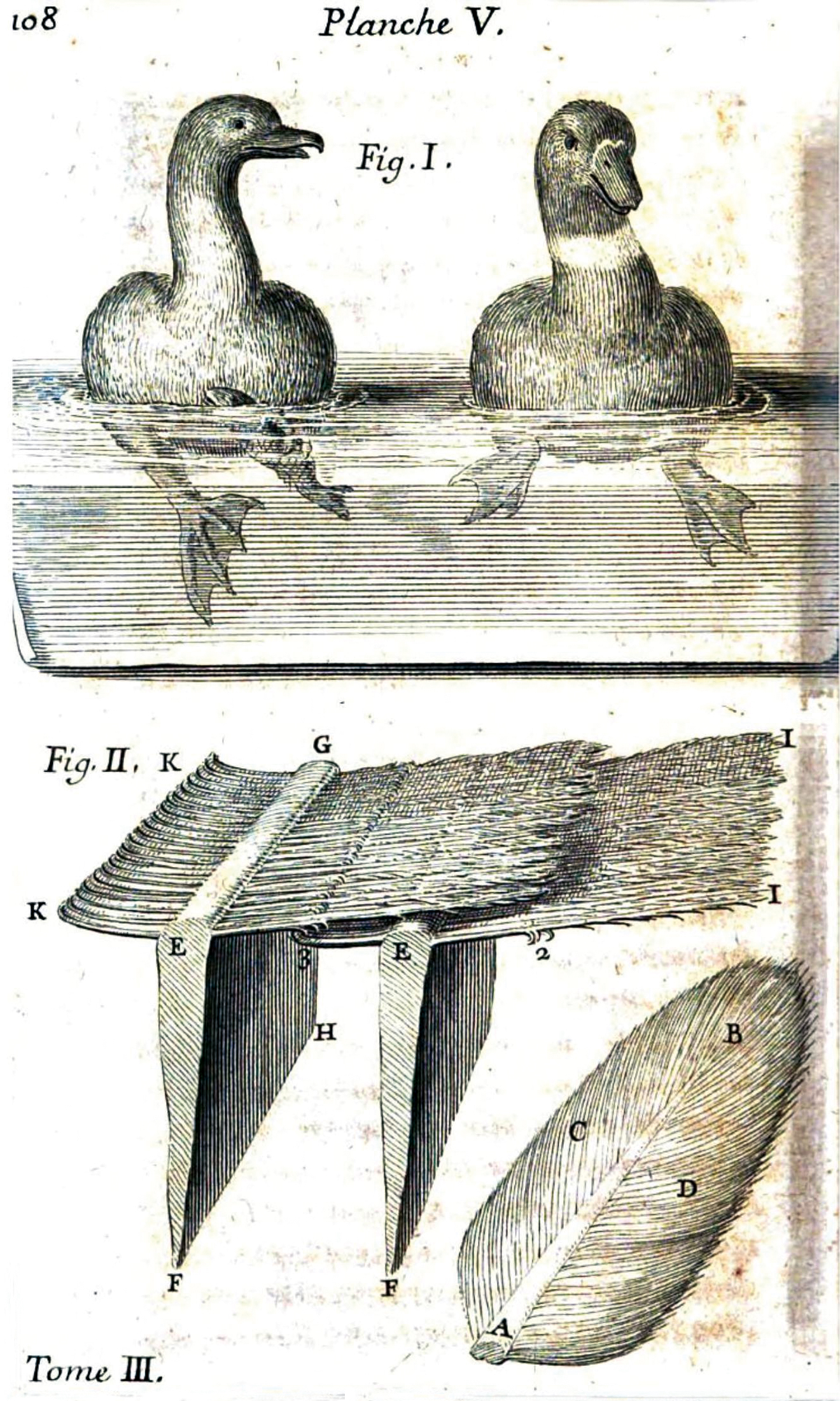 Planche de Essais de physique, ou Recueil de plusieurs traitez touchant les choses naturelles.